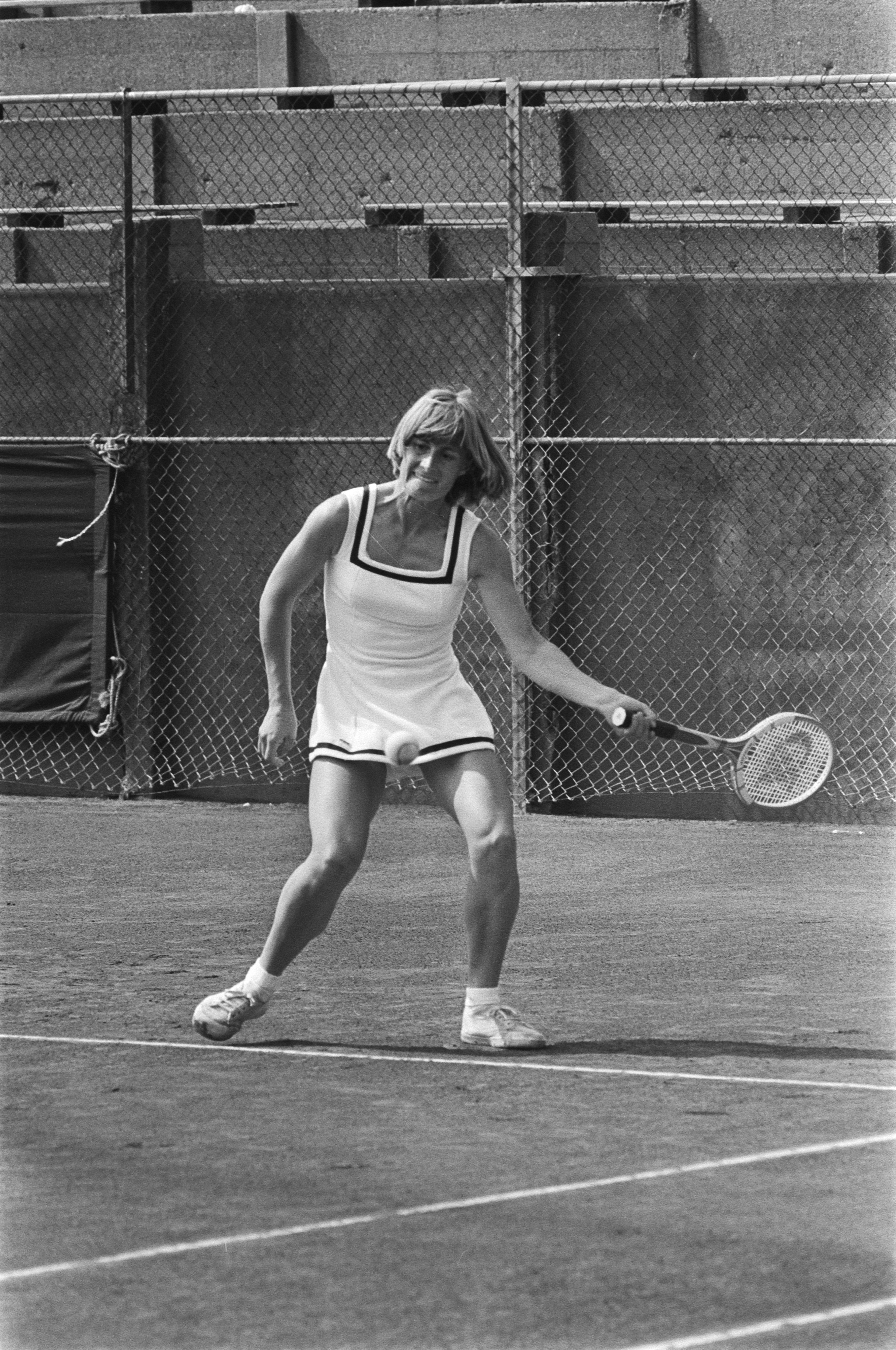 Collectie / Archief : Fotocollectie Anefo Reportage / Serie : [ onbekend ] Beschrijving : Nationale Kampioenschappen Tennis 1976, Marijke Schaar Datum : 11 augustus 1976 Trefwoorden : TENNIS Persoonsnaam : Schaar, Marijke Fotograaf : Mieremet, Rob / Anefo Auteursrechthebbende : Nationaal Archief Materiaalsoort : Negatief (zwart/wit) Nummer archiefinventaris : bekijk toegang 2.24.01.05 Bestanddeelnummer : 928-7280